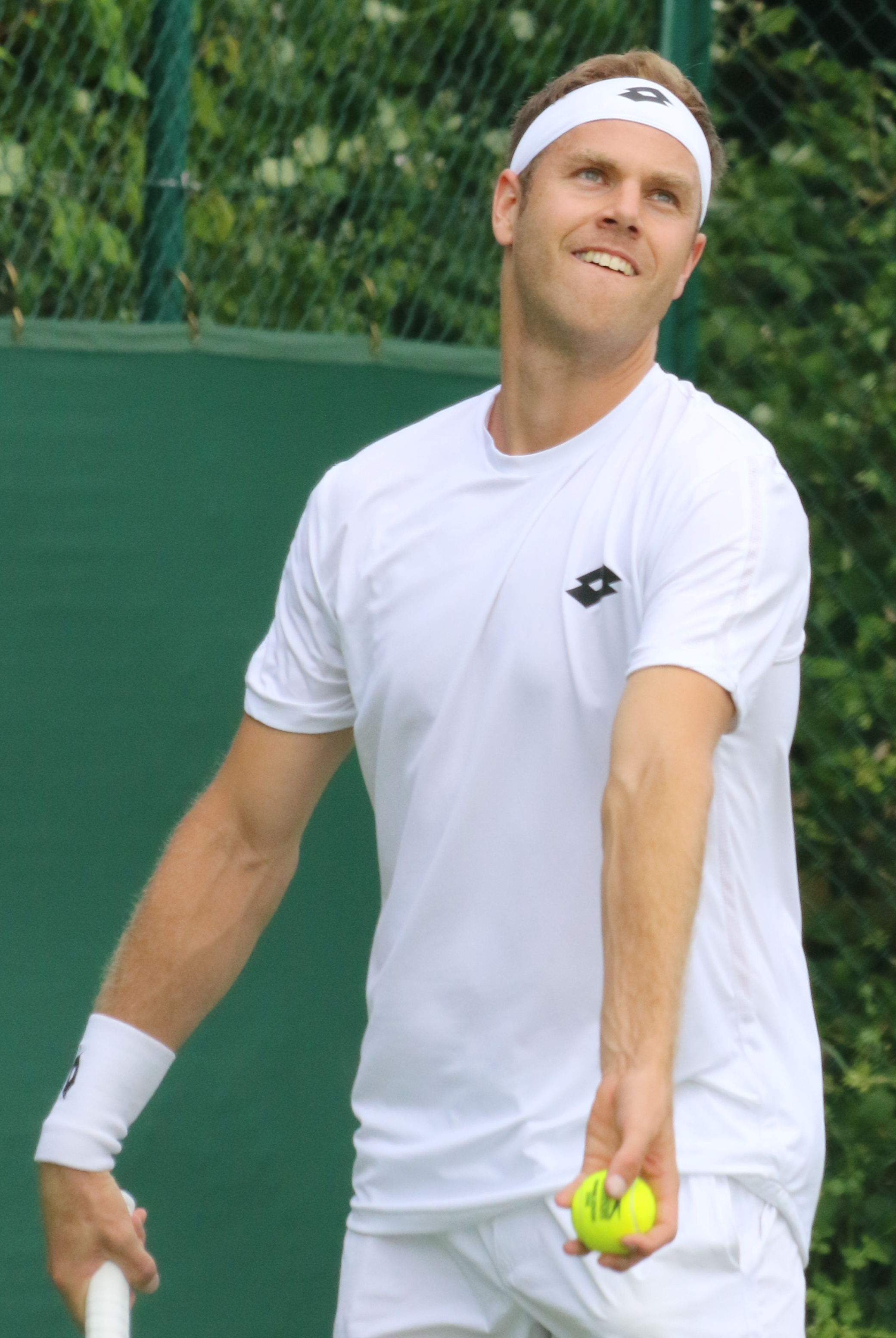 Reister WMQ16 (1)